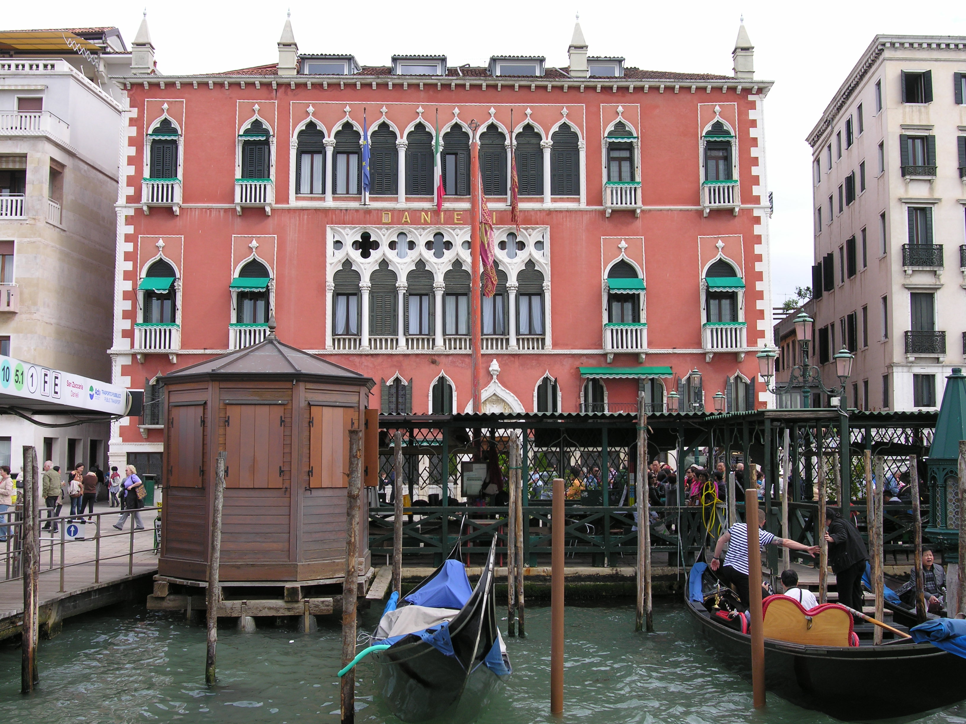 Castello, 30100 Venezia, Italy